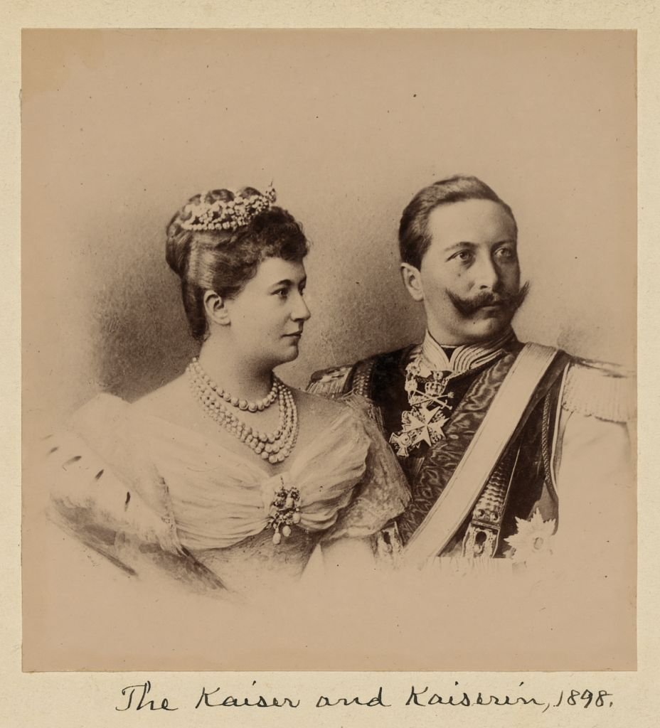 Kaiser Wilhelm II with Kaiserin (Empress) Auguste Viktoria, 1898